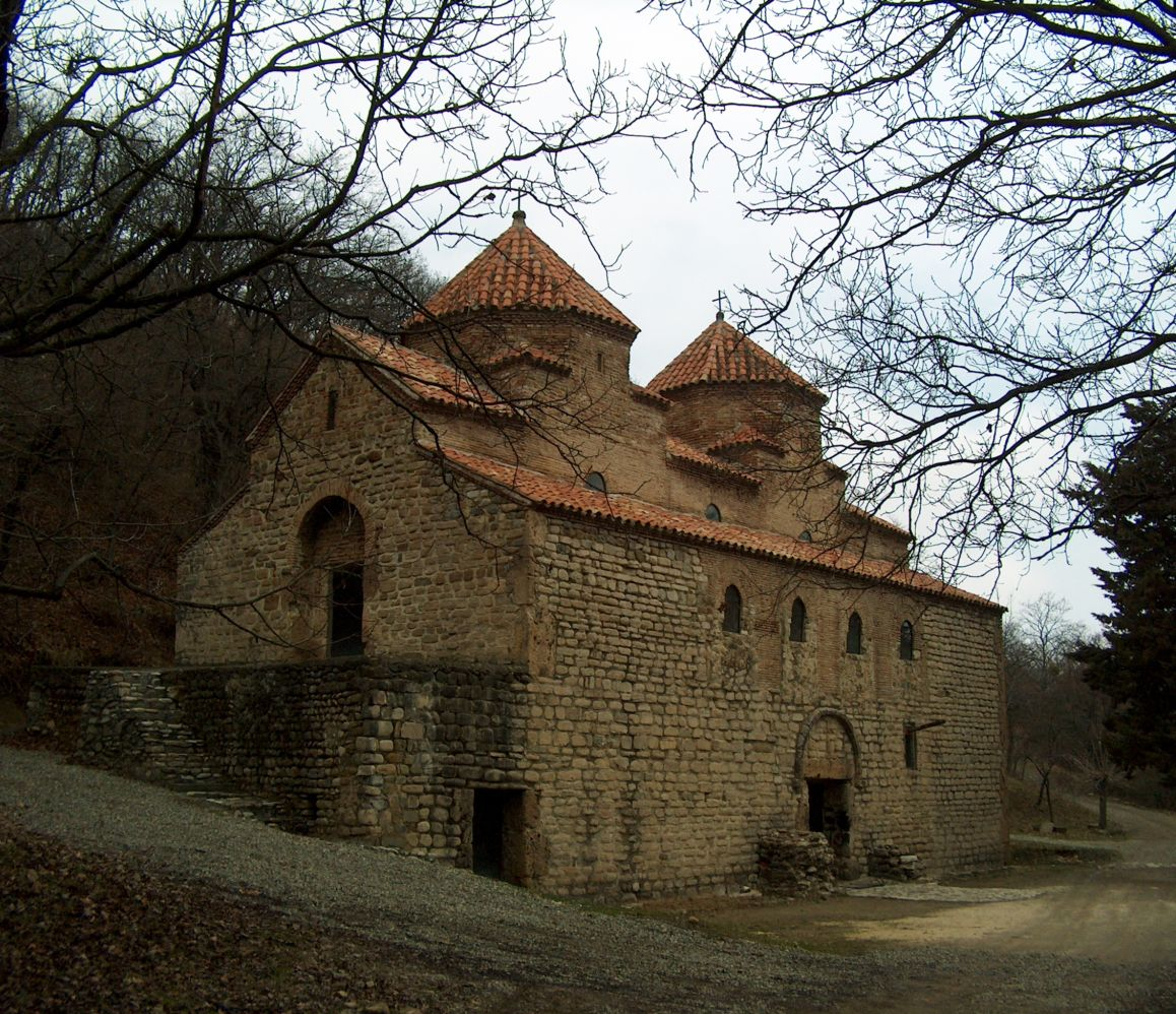 Храм Квелацминда (Всех Святых)в Гурджаанском районе Грузии